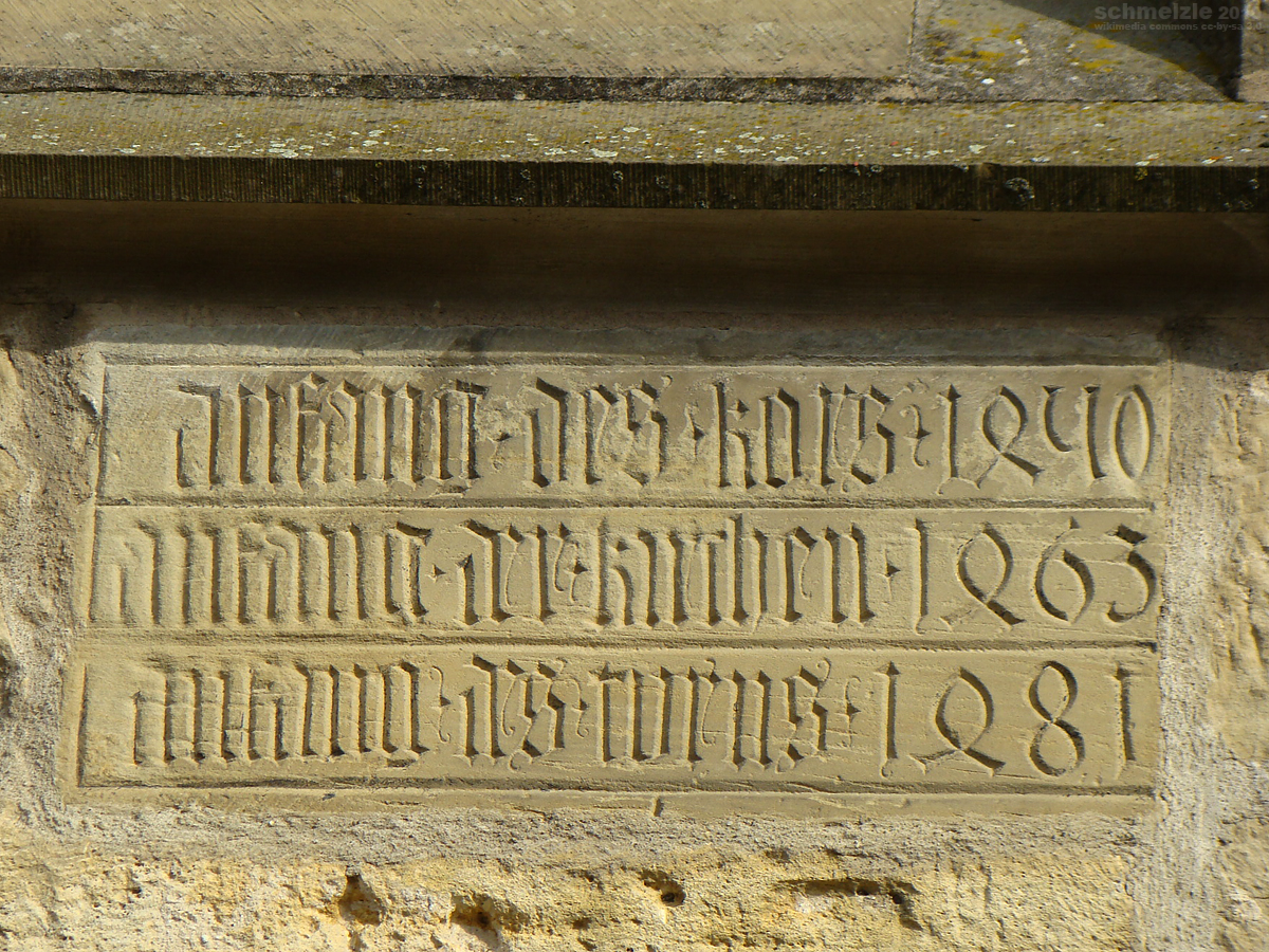 Baudatierung am Turm der Alexanderkirche in Marbach am Neckar